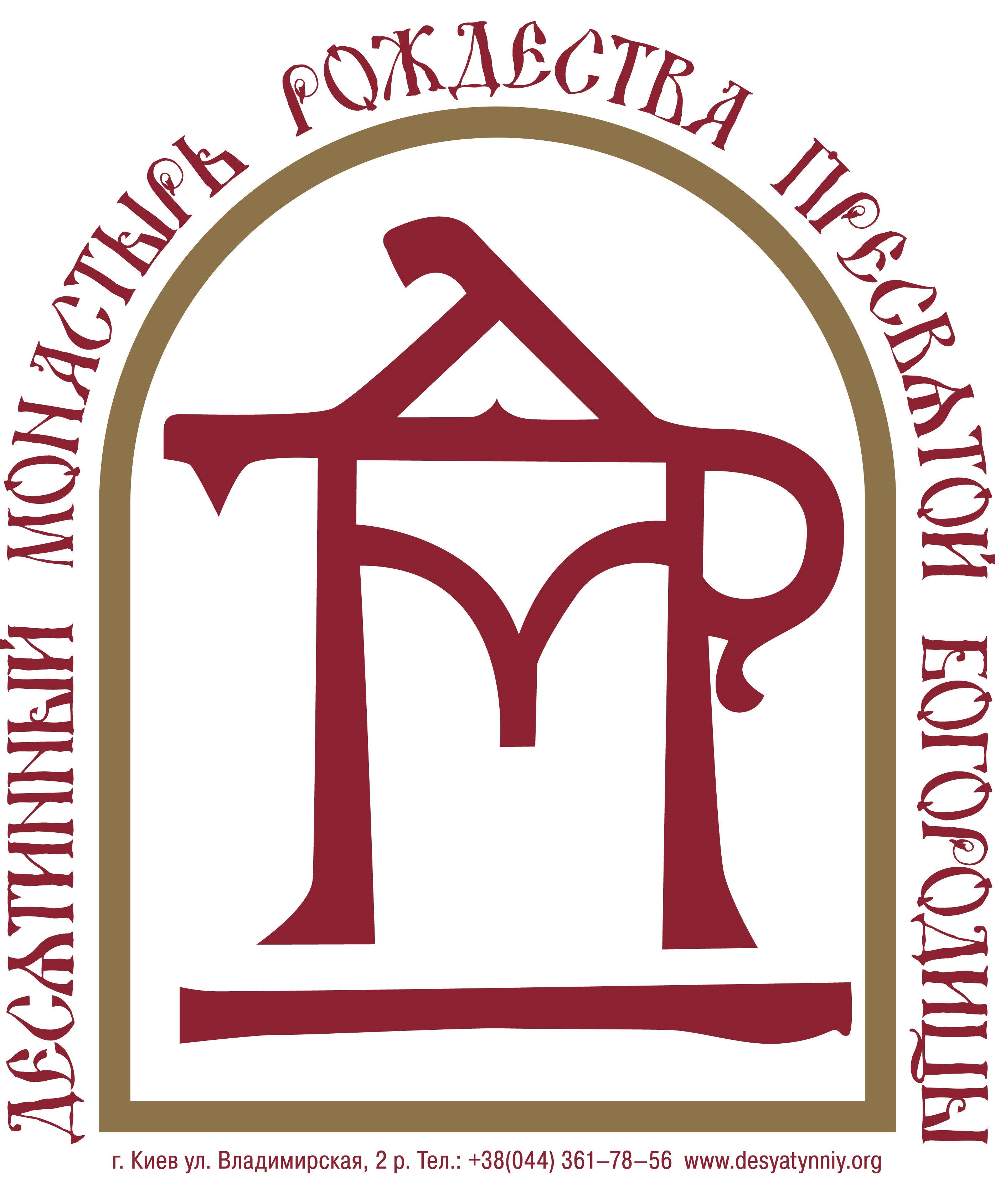 аббревиатура из букв ДМР, которые расшифровываются как Десятинный монастырь или Матерь Божия